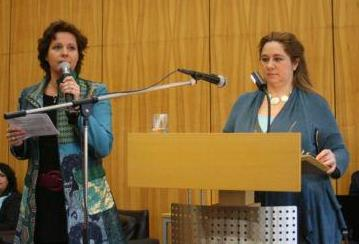 Regina Gärtner und WDR-Moderatorin Steffi NeuDepicted people: Hanna Caspian and Steffi Neu